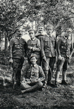 Grupa oficerów 2 pułku piechoty Legionów Polskich: Franciszek Marian Sudoł, Seweryn Łańcucki, Stanisław Kara, Piotr Michalecki, Aleksander Stawarz, Michał Kostmanowicz (siedzi).